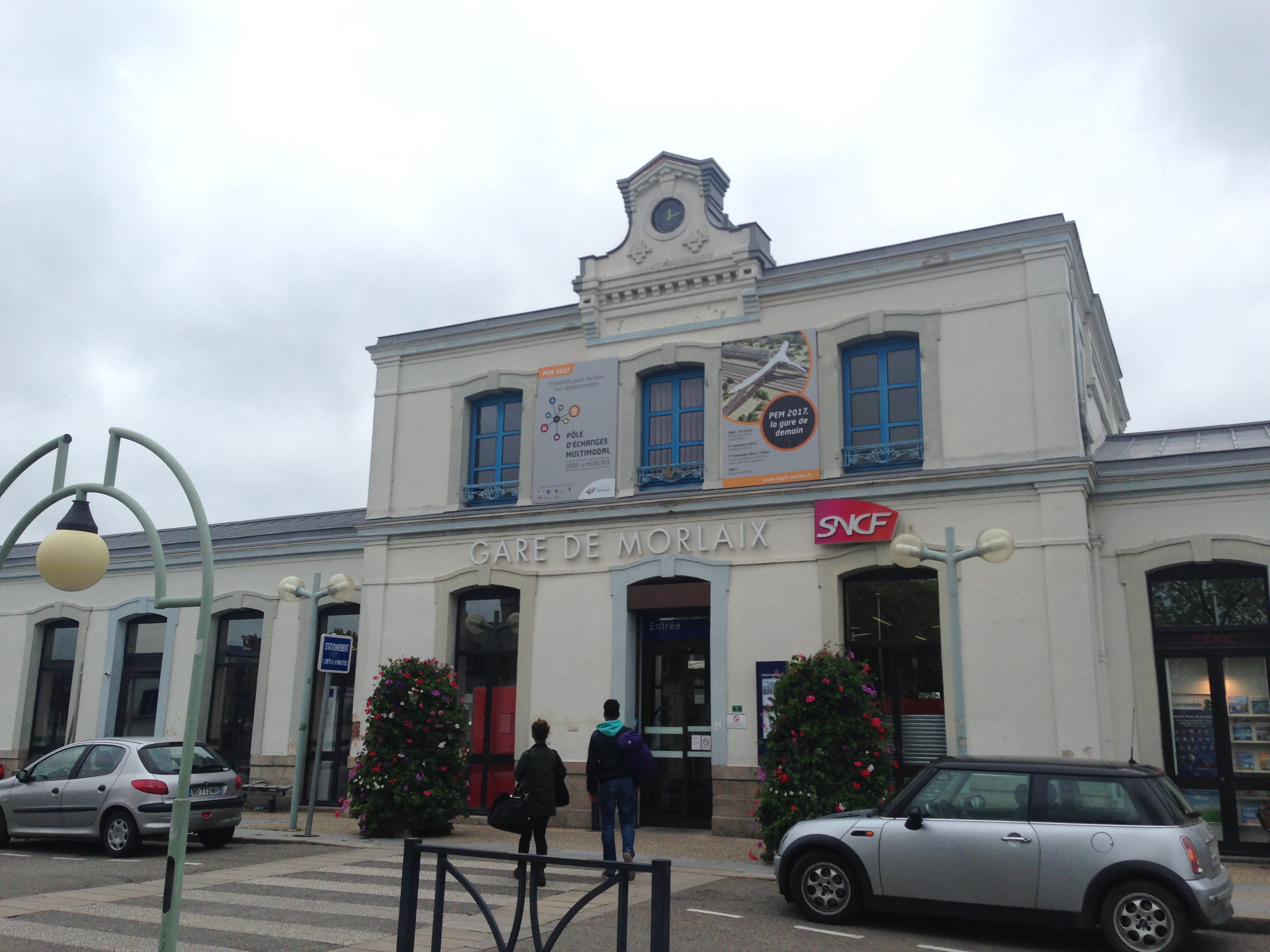 Gare de Morlaix-2015